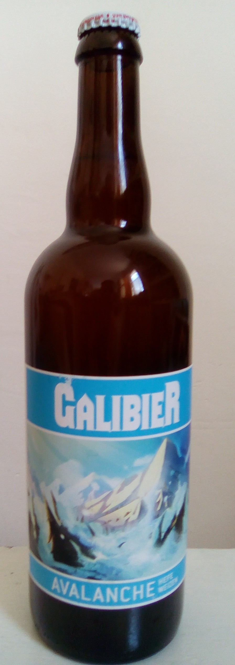 Bière blanche "Avalanche" de la micro-brasserie Galibier (Savoie)